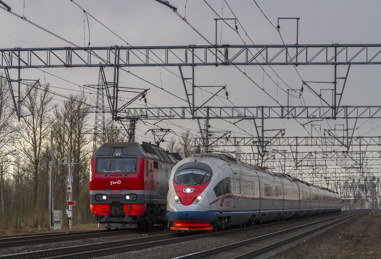 Двухсистемный электропоезд, построен в десятивагонной составности С завода поступил в Северо-Западную дирекцию скоростного сообщения.